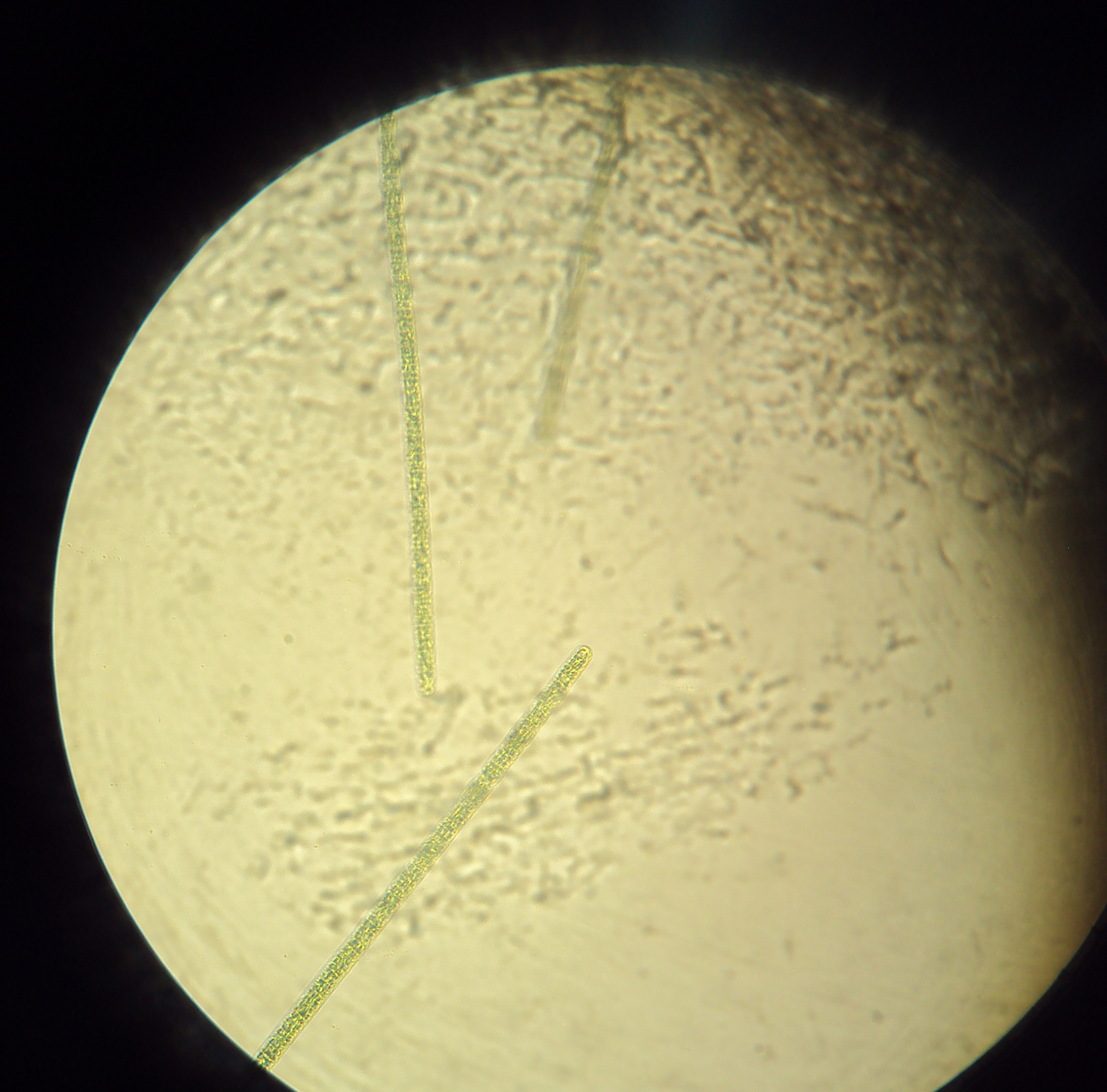 Planktothrix agardhii ao Microscópio Óptico, aumento de 400x.